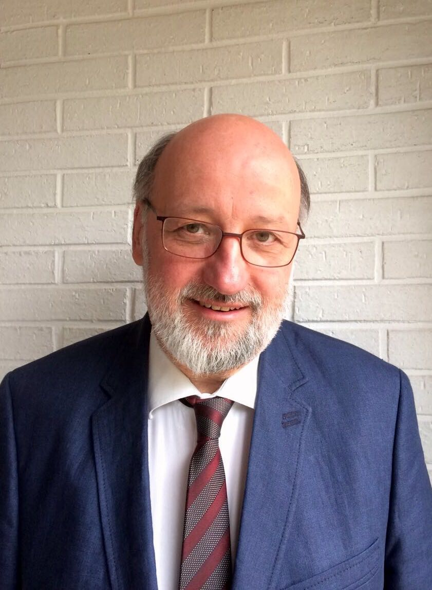 Foto von Michael Erler